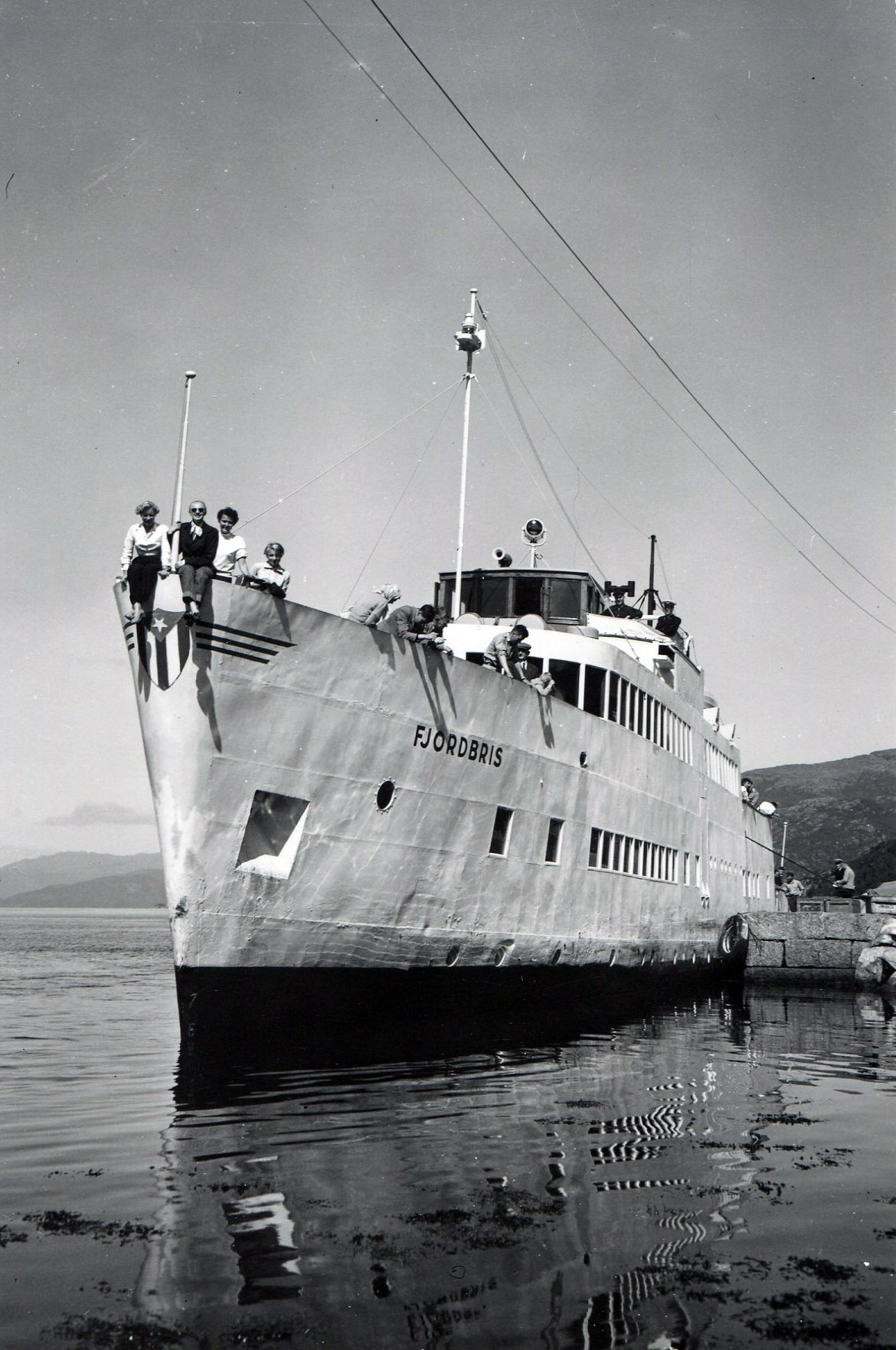 Ikke verst å få være gallionsfigur på MS "Fjordbris"! Vi vet ikke når bildet er tatt, men ifølge Digitalt Museum/Stavanger Museum ble båten bygget i 1948. Vi tar gjerne i mot flere opplysninger og/eller gode reiseopplevelser med Fjordbris. Bildet fra arkivet etter Landslaget for reiselivet i Norge (PA-722_Uaa5_003). Publisert som en del av prosjektet #arkivsommer sommeren 2014.